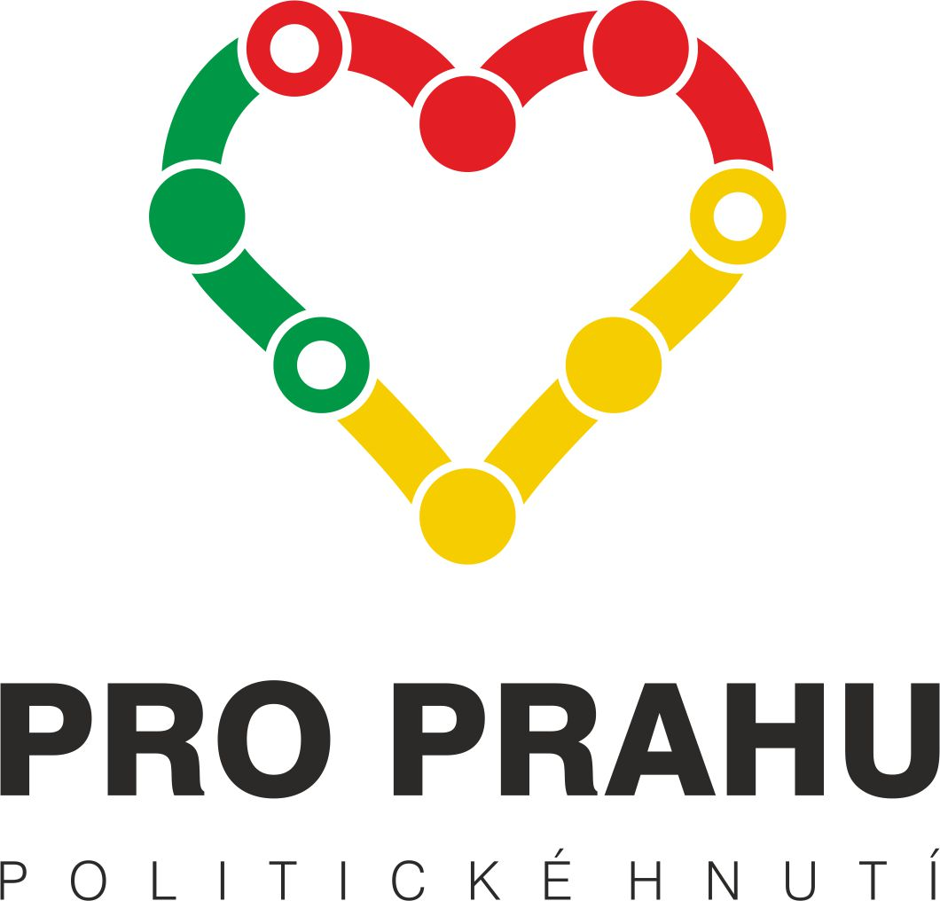 logo hnutí Pro Prahu